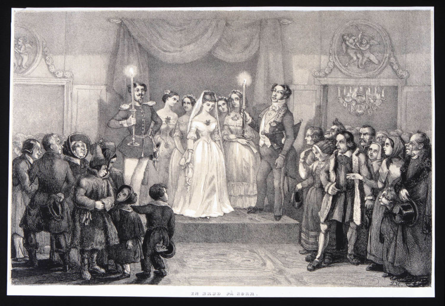 "En brud på norr". En brud med tärnor i sal med gäster. Två män lyser upp bruden med två stora ljusstakar. Litografi av Fritz von Dardel, 1830-/-40-tal.